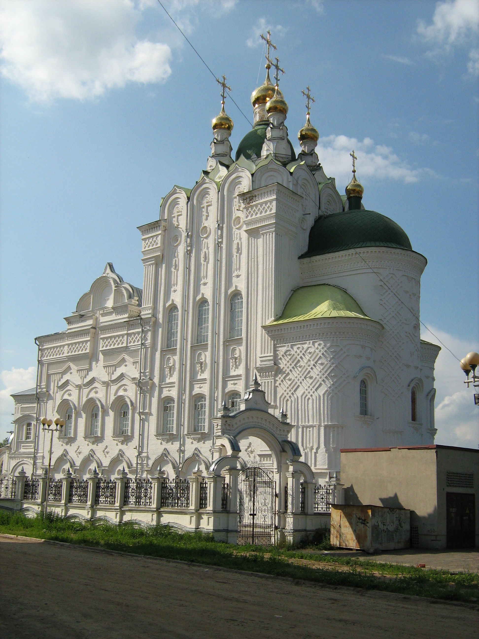 Церковь Пресвятой Троицы